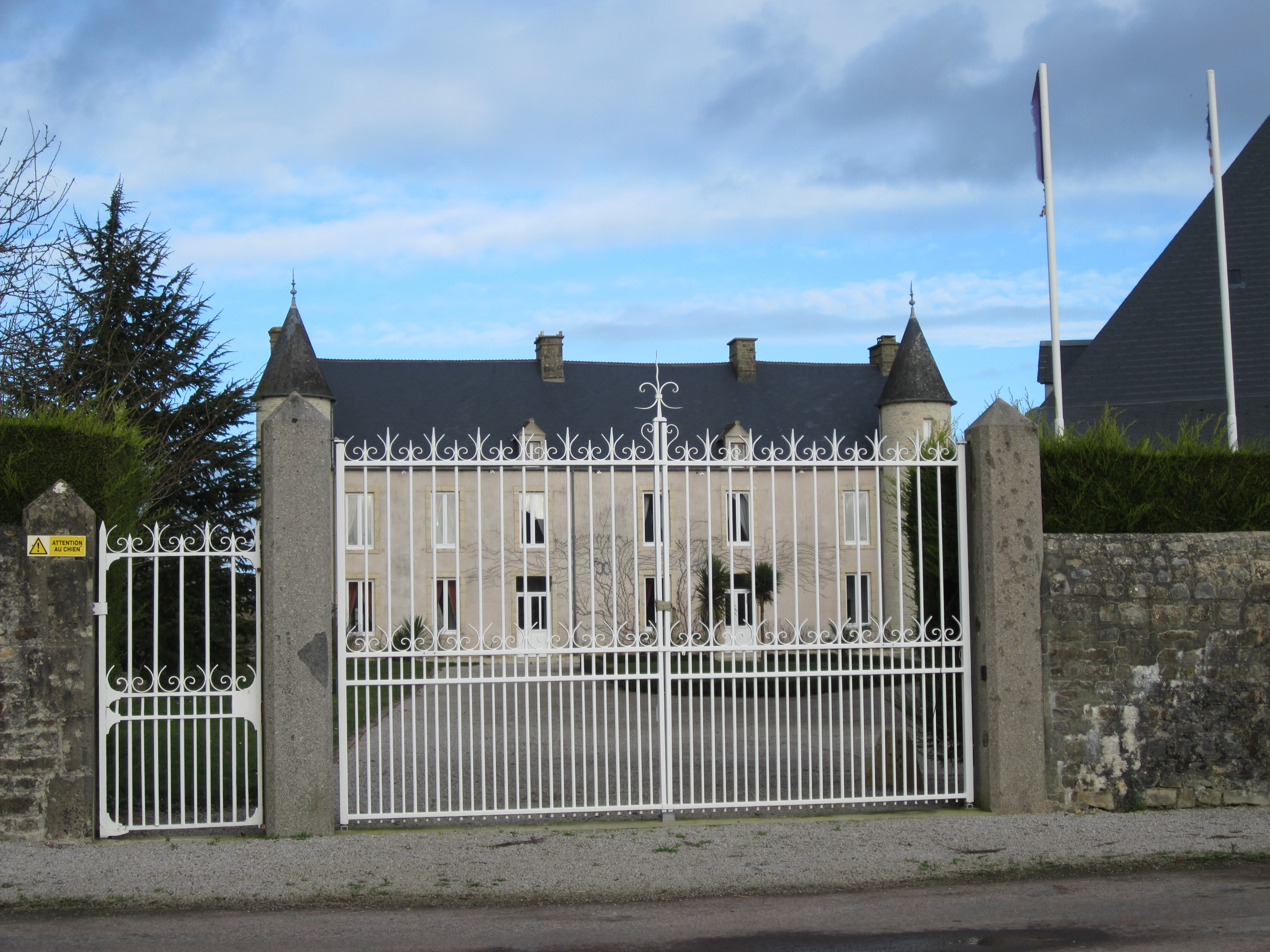 Manoir d'Artilly, Beuzeville-au-Plain